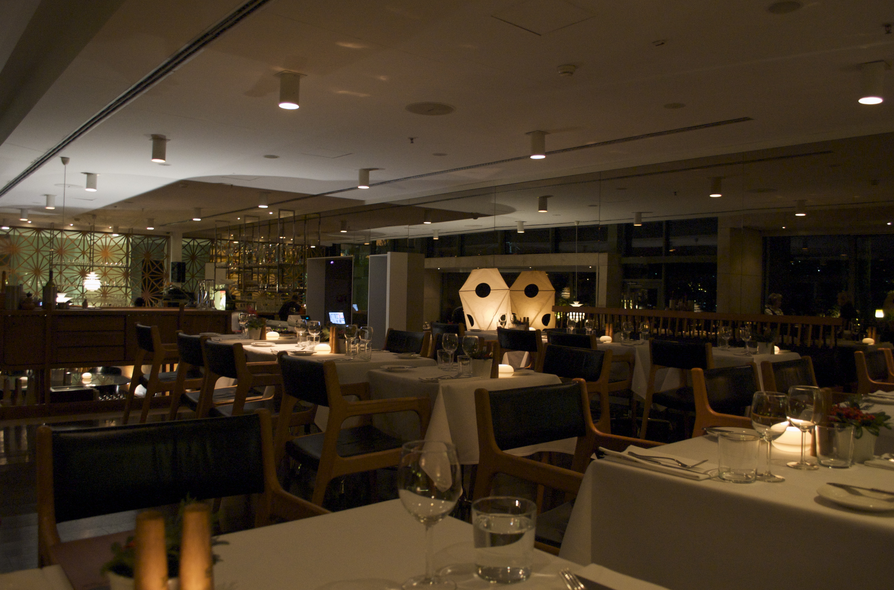 Müze de changa